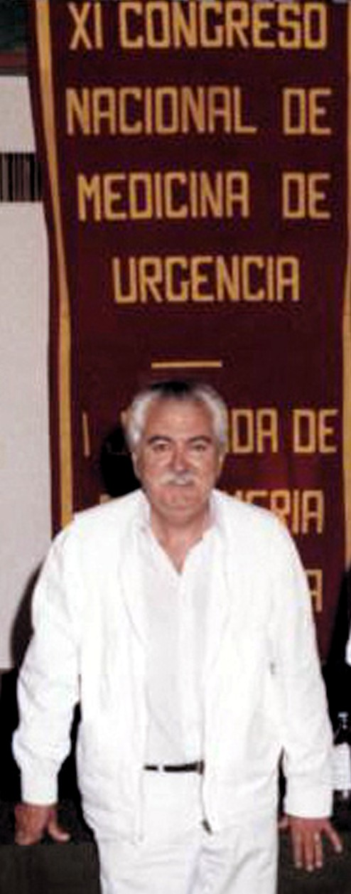 en un congreso de Medicina de Urgencias donde seria ponente de una confererncia